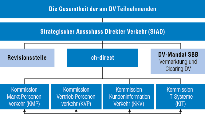 Die Gesamtheit aller Teilnehmenden am Direkten Verkehr ist mit äquivalentem Stimmrecht (eine Stimme für jeden) die höchste Instanz des Direkten Verkehrs.